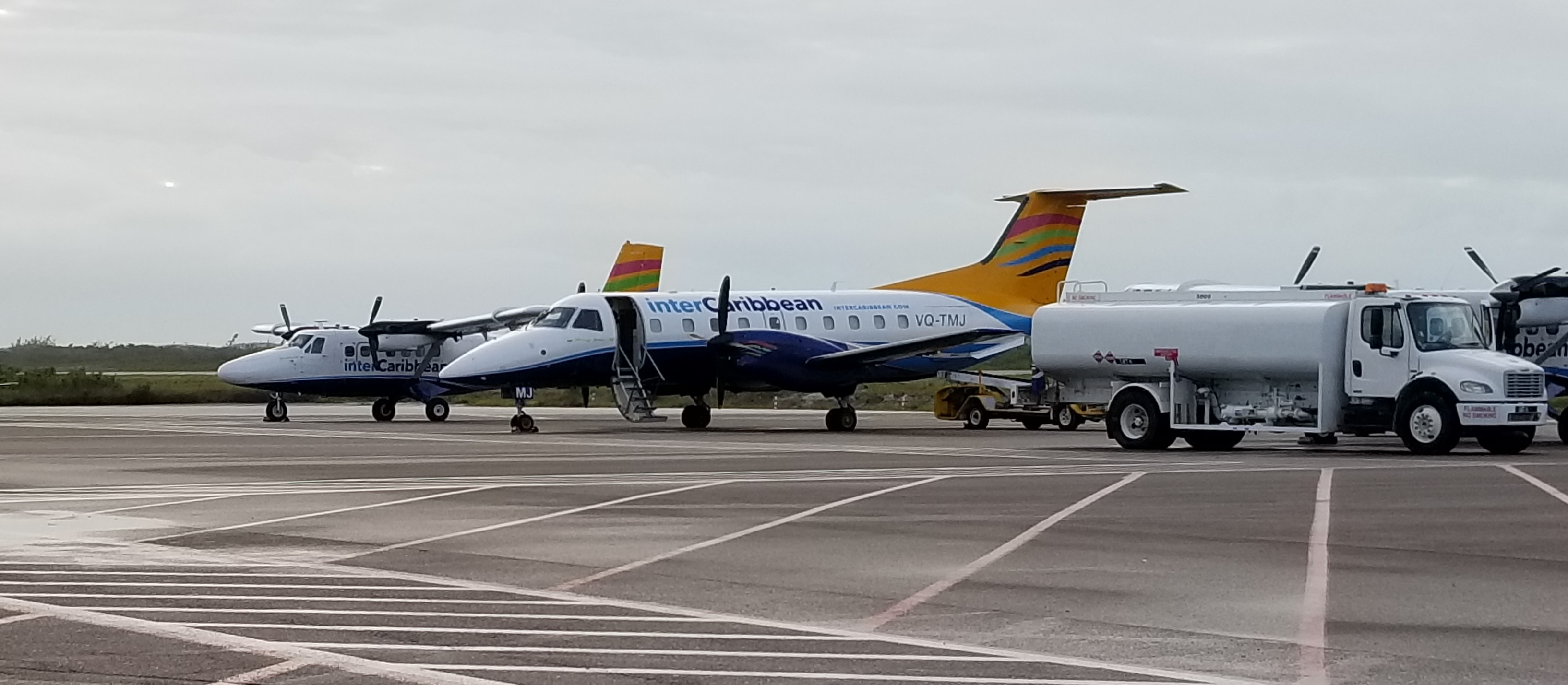 Caicos